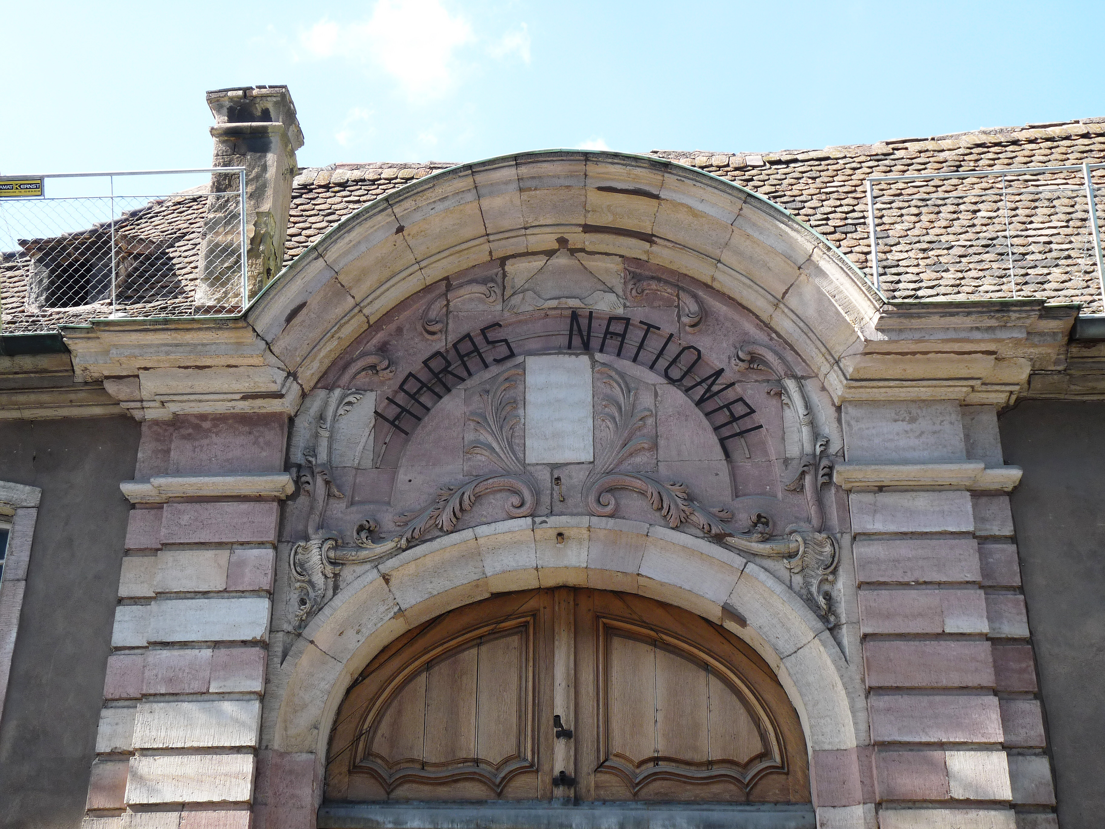 Strasbourg : bâtiments de l'ancien Haras national, 1 rue Sainte-Elisabeth. Certains éléments classés par les Monuments historiques en 1922, d'autres en 1987.